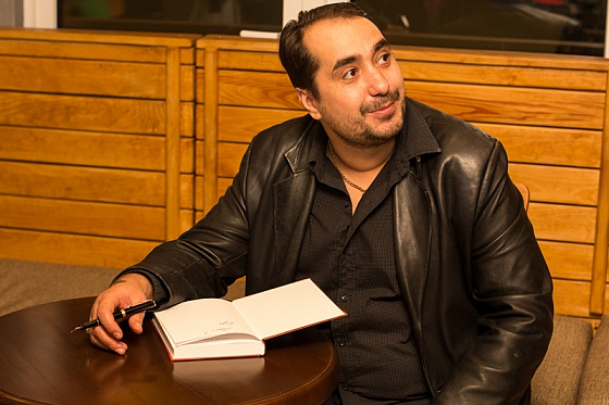 Автографсессия Алексея Курилко после его творческого вечера в ресторане "Любовь-морковь" в г. Киев, в 2013 году